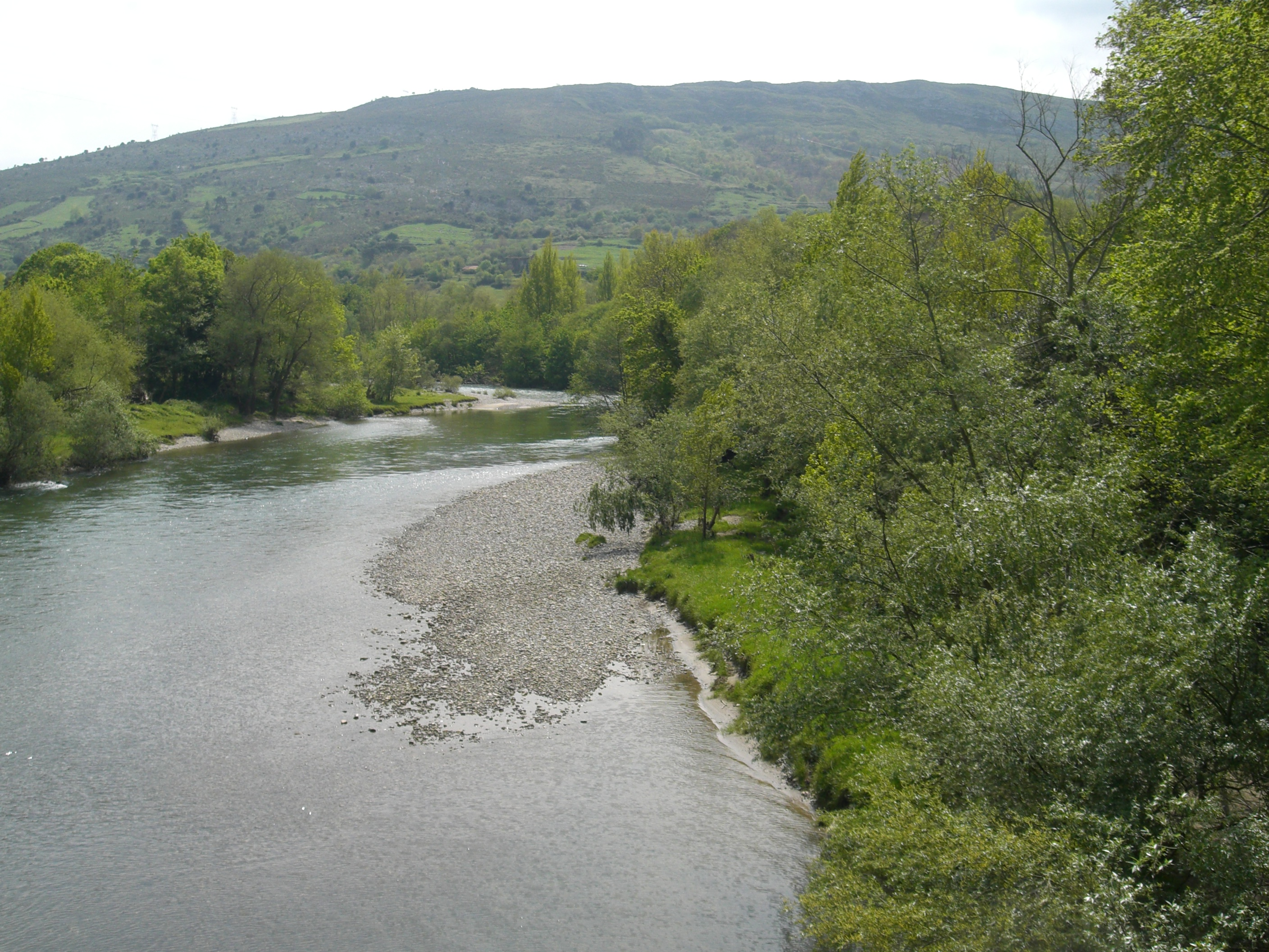 Después de juntarse los ríos Deva y Cares, el DevaCares sigue su camino hacia el mar Cantábrico.